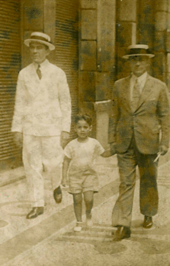 Fernando Henrique Cardoso caminha com o pai em meados da década de 1930.